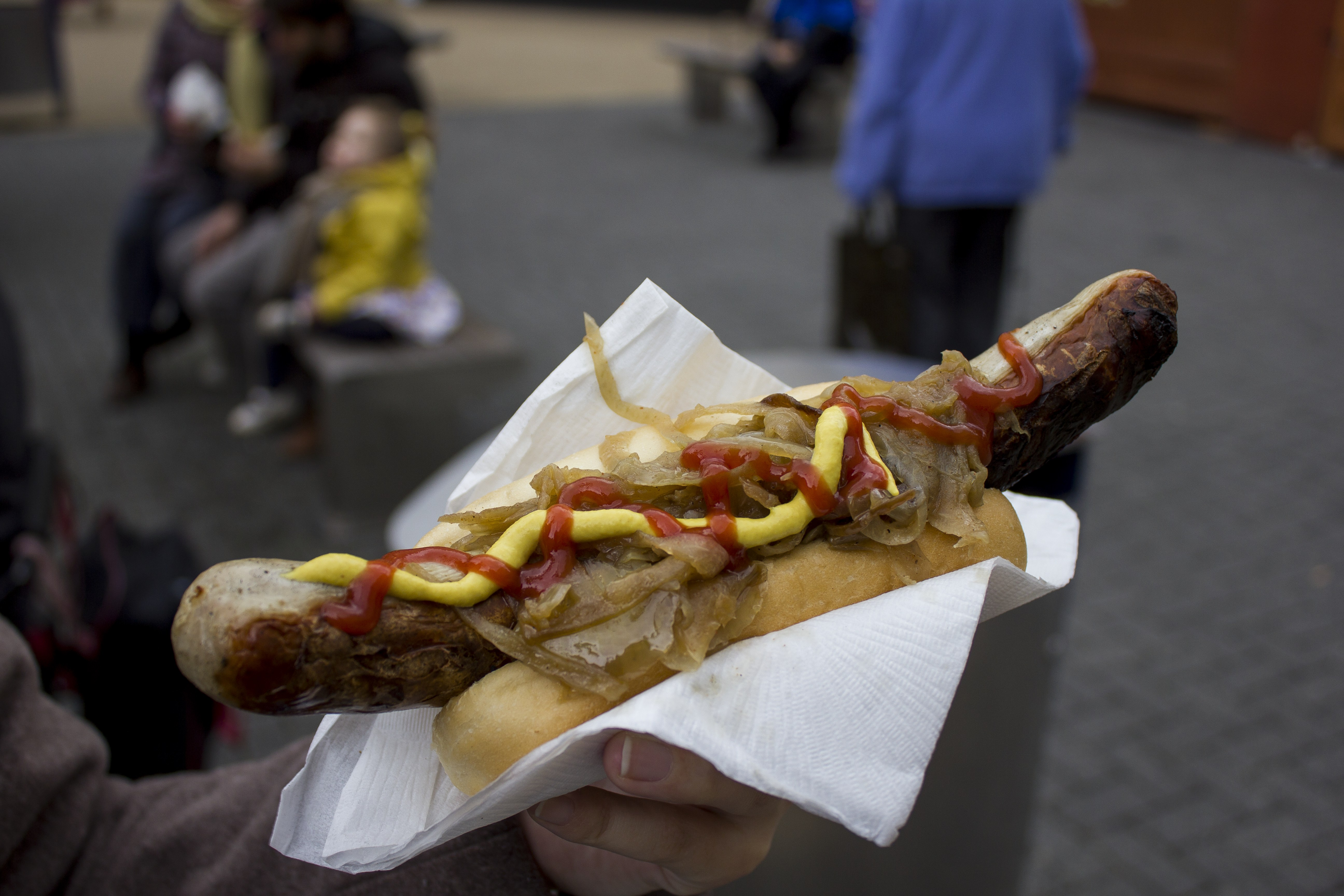 Bratwurst sausage